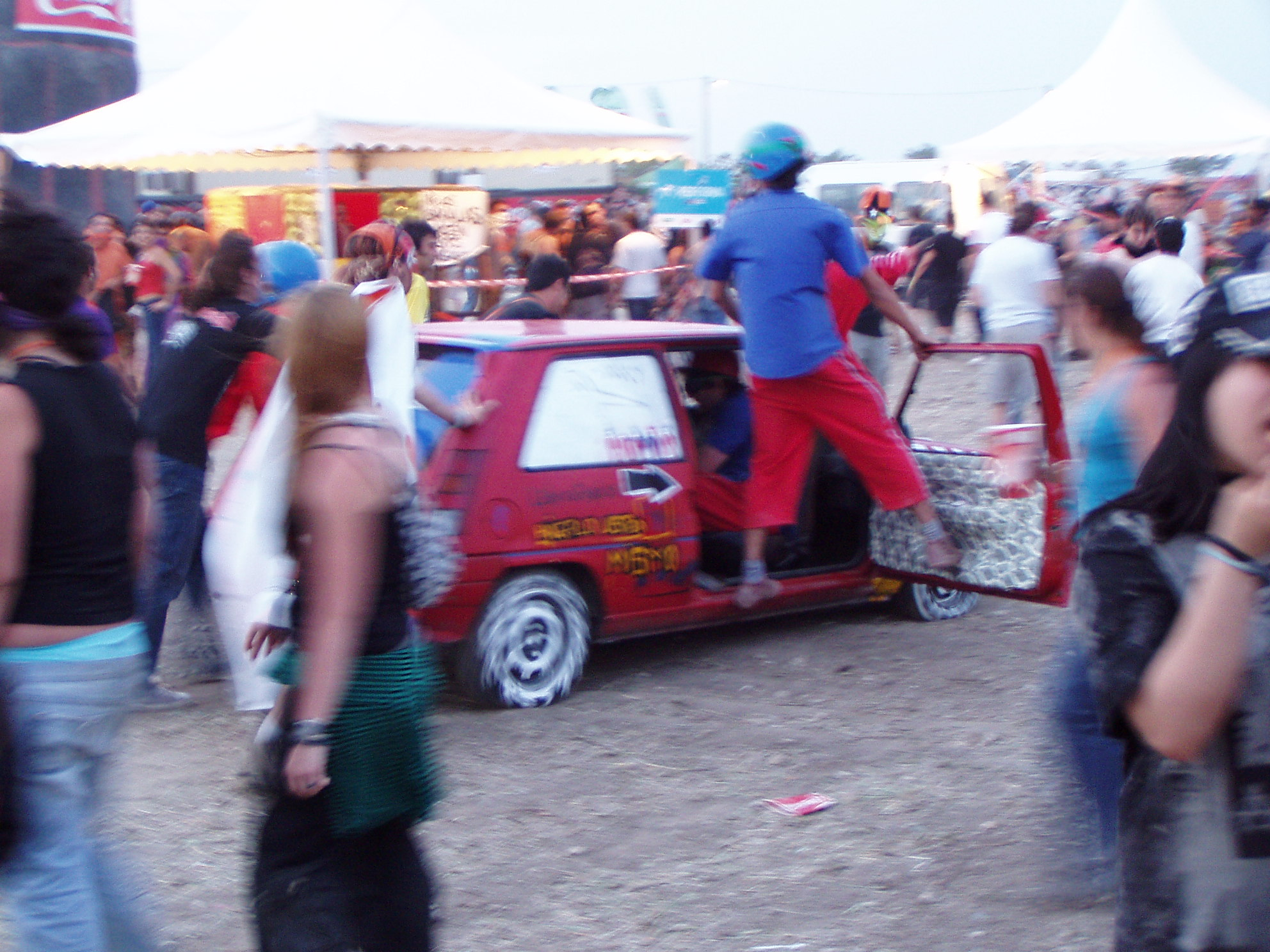 Festimad Performa'05 - El coche rojo en plena performance